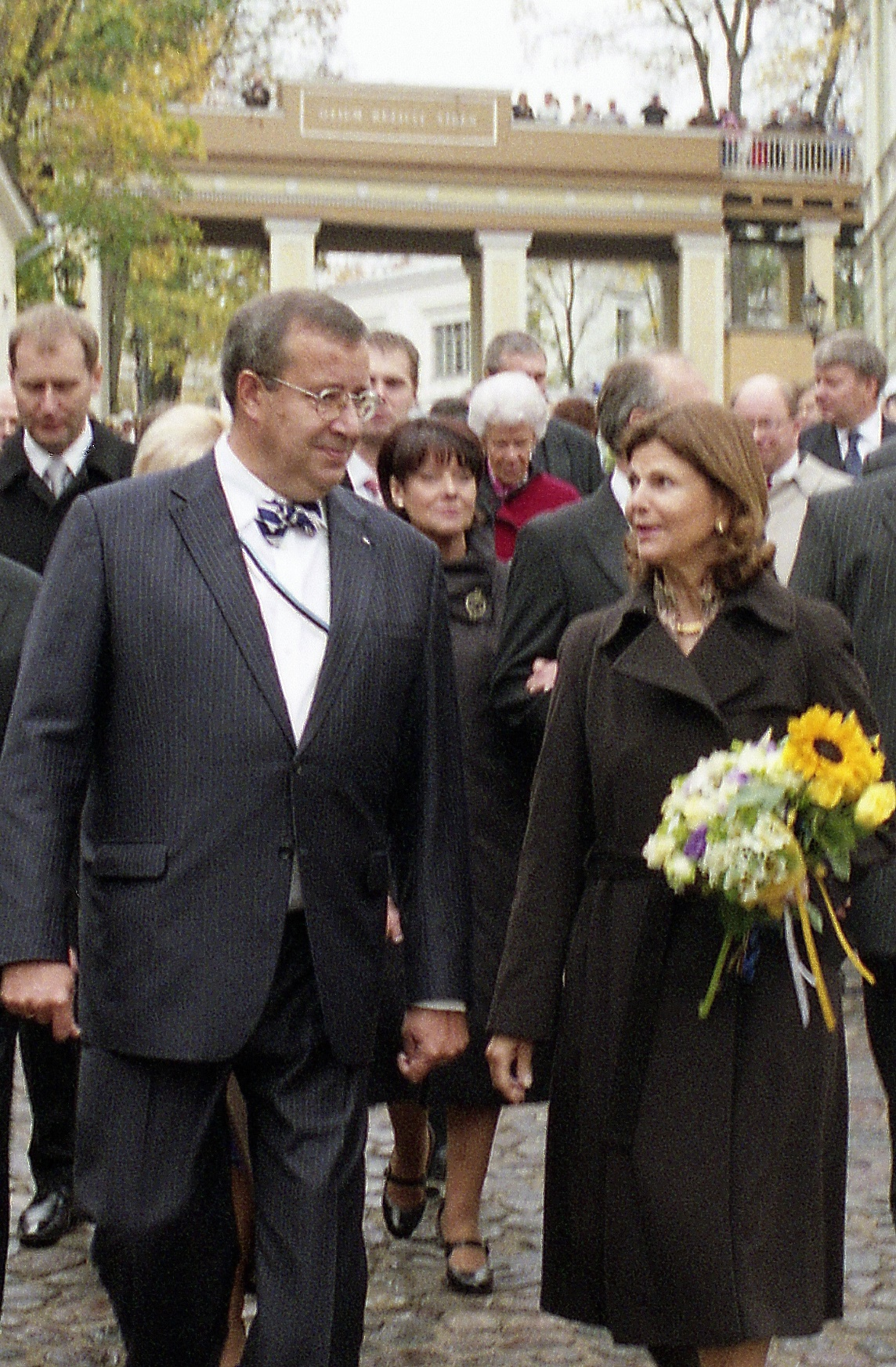 Fotografie von Toomas Hendrik Ilves und Silvia von Sweden beim 375. Jubiläum der Universität Tartu.